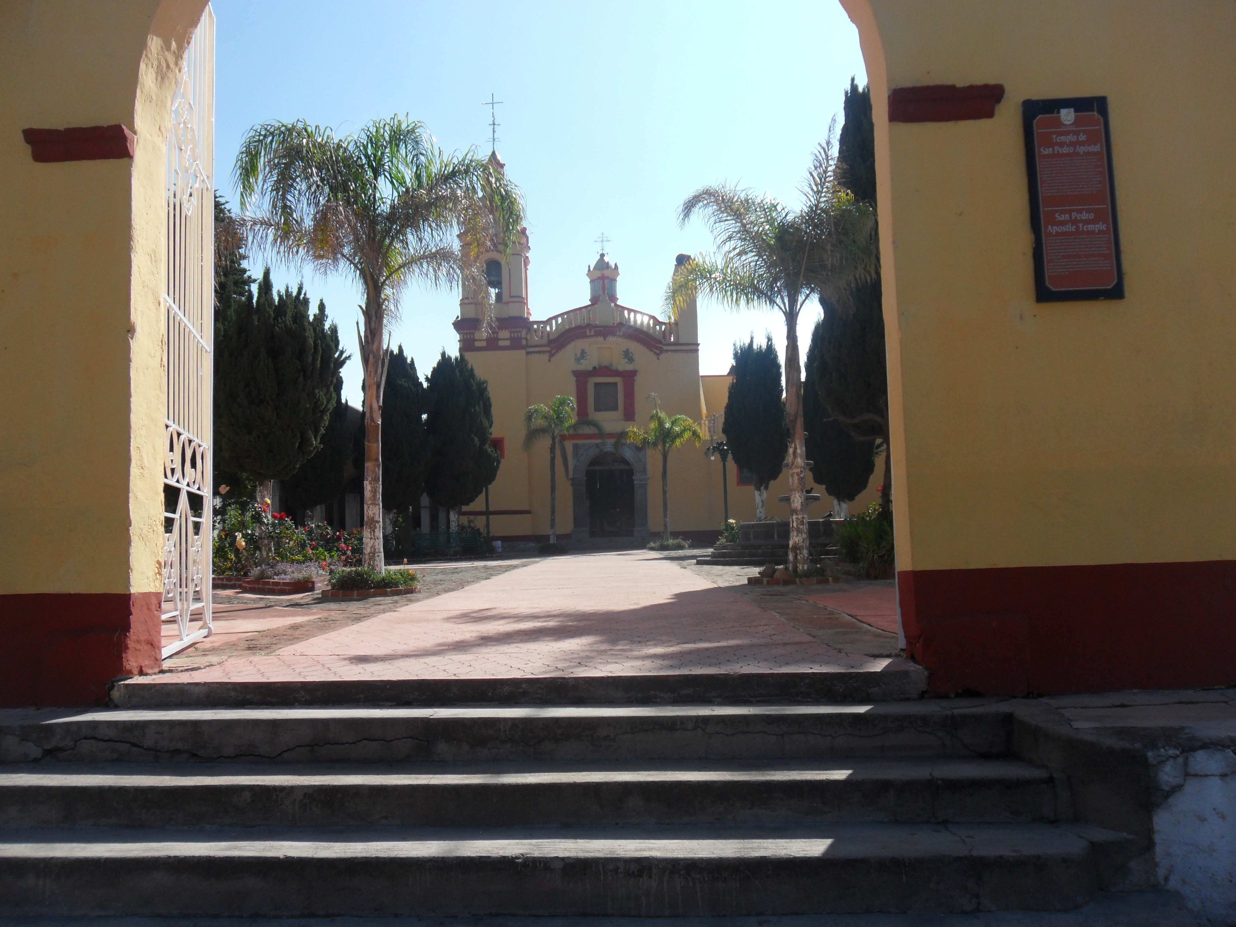 Iglesia principal dedicada a San Pedro Apóstol, en el centro de población de San Pedro Tlalcuapan.